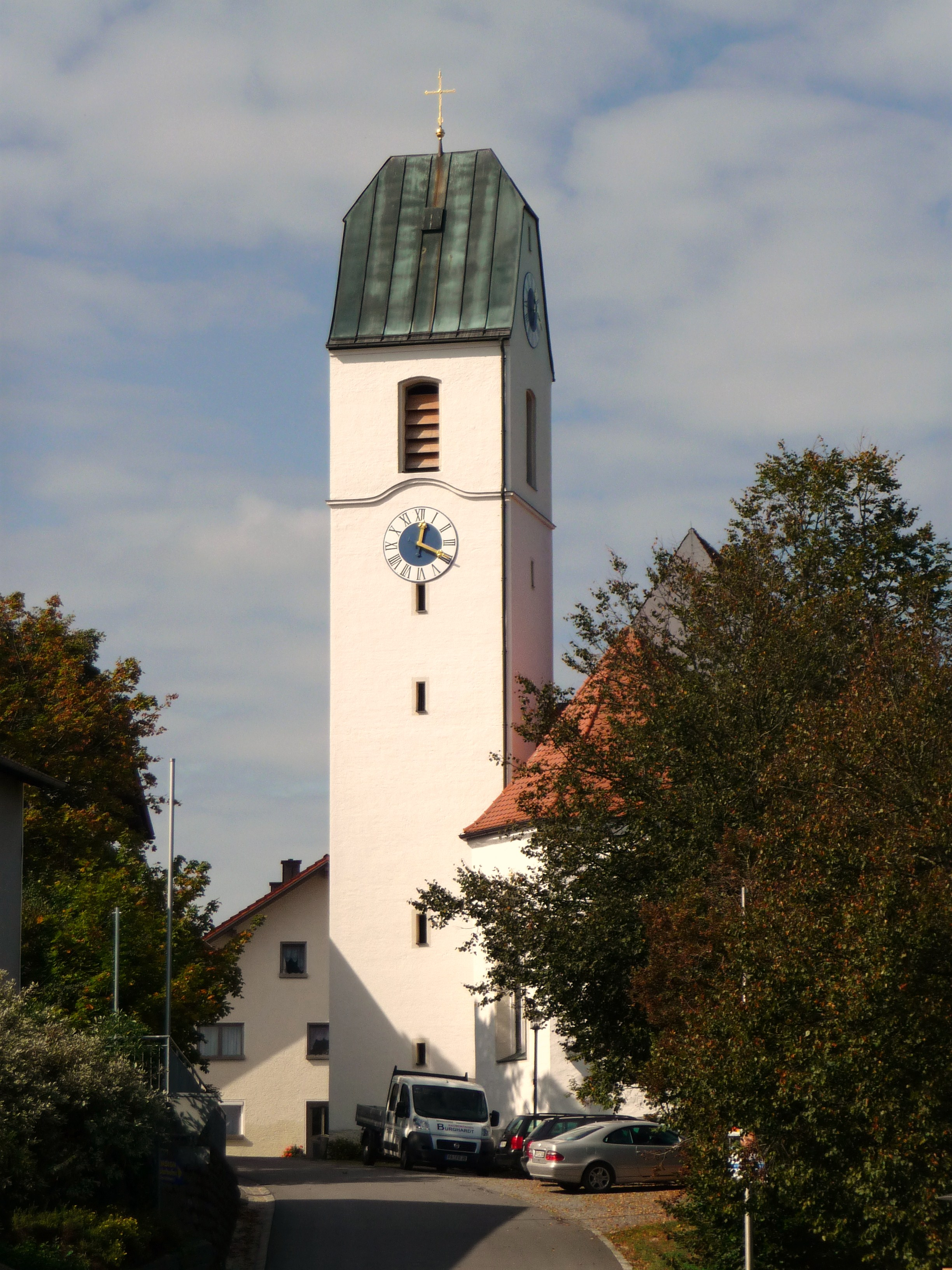 Turm der Pfarrkirche St. Johannes der Täufer in Kirchberg vorm Wald